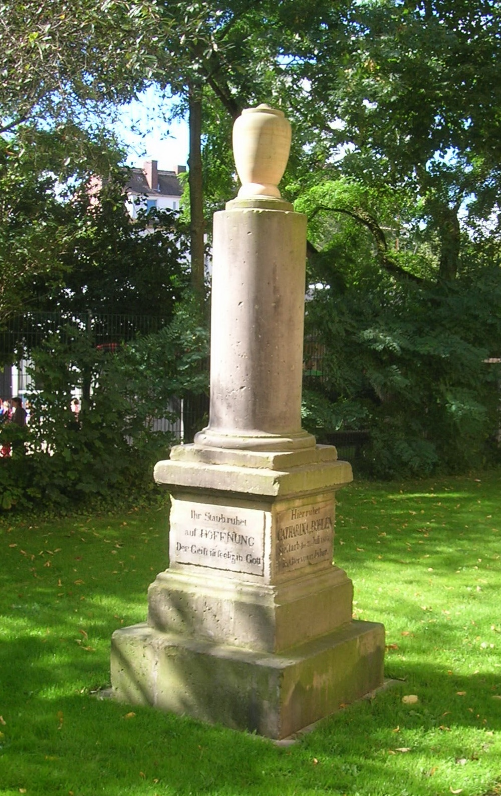 Stele für Catharina Bohlen († 21. Juli 1807) bei der Dionysiuskirche (Bremerhaven-Lehe).